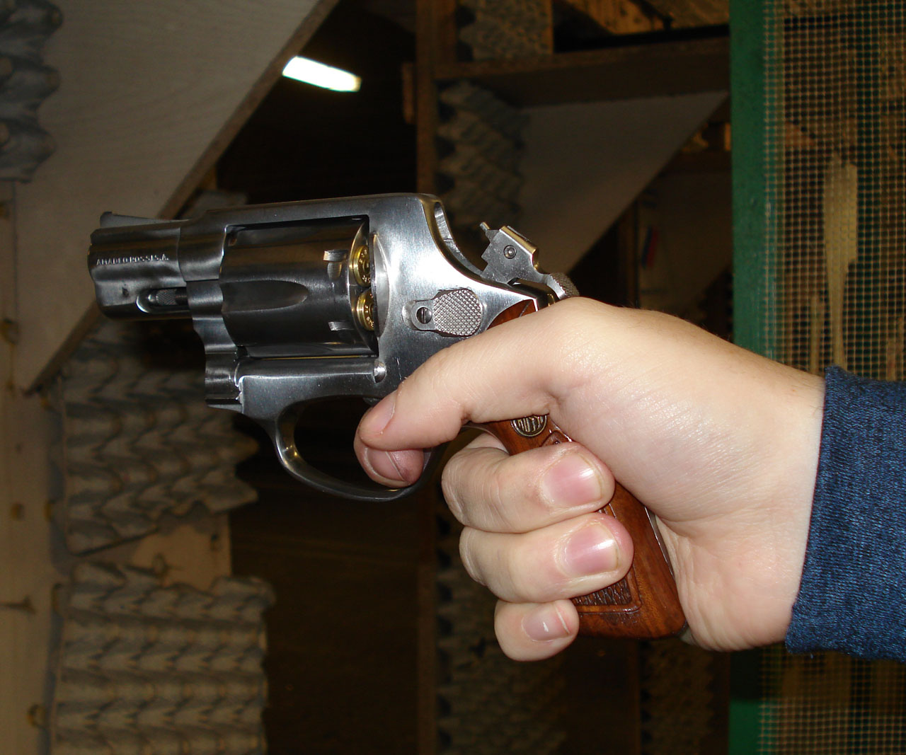 Rewolwer Rossi R35202 - zdjęcie: Michał Sulczyński.